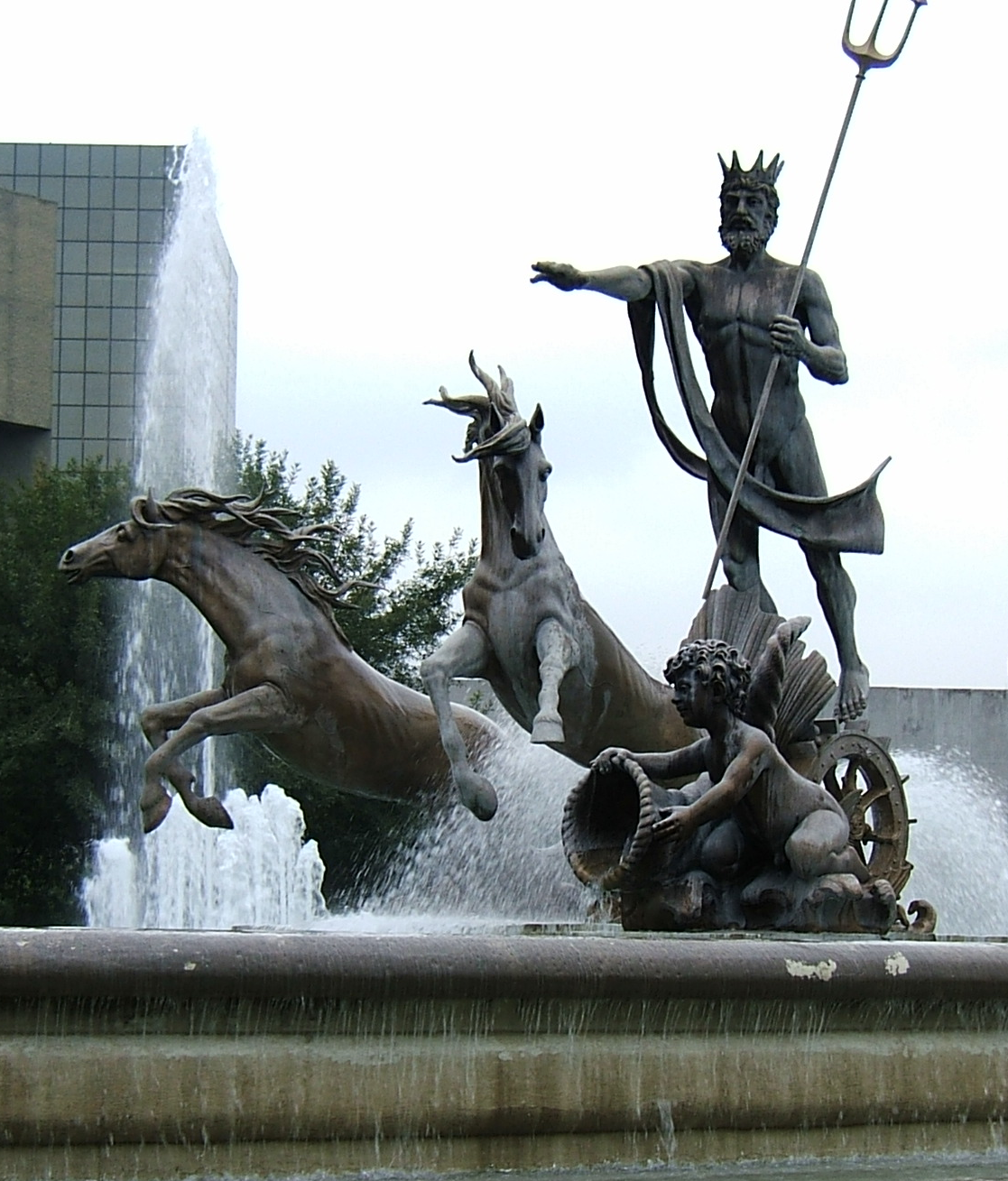 Photo d'une fontaine ( de Poséidon ) à Monterrey, au Mexique.